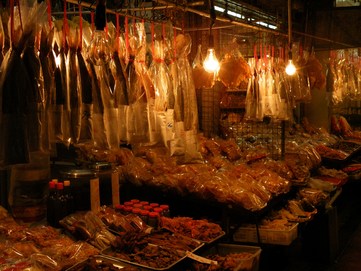 Lau Fau Shan Main Street